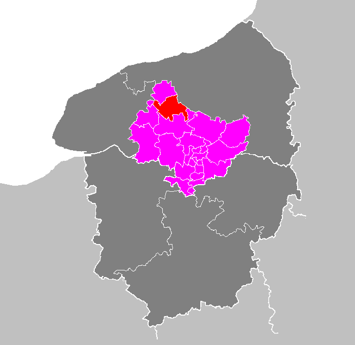 Maps of arrondissements and cantons of France: Arrondissement de Rouen - Canton d Yerville.PNG